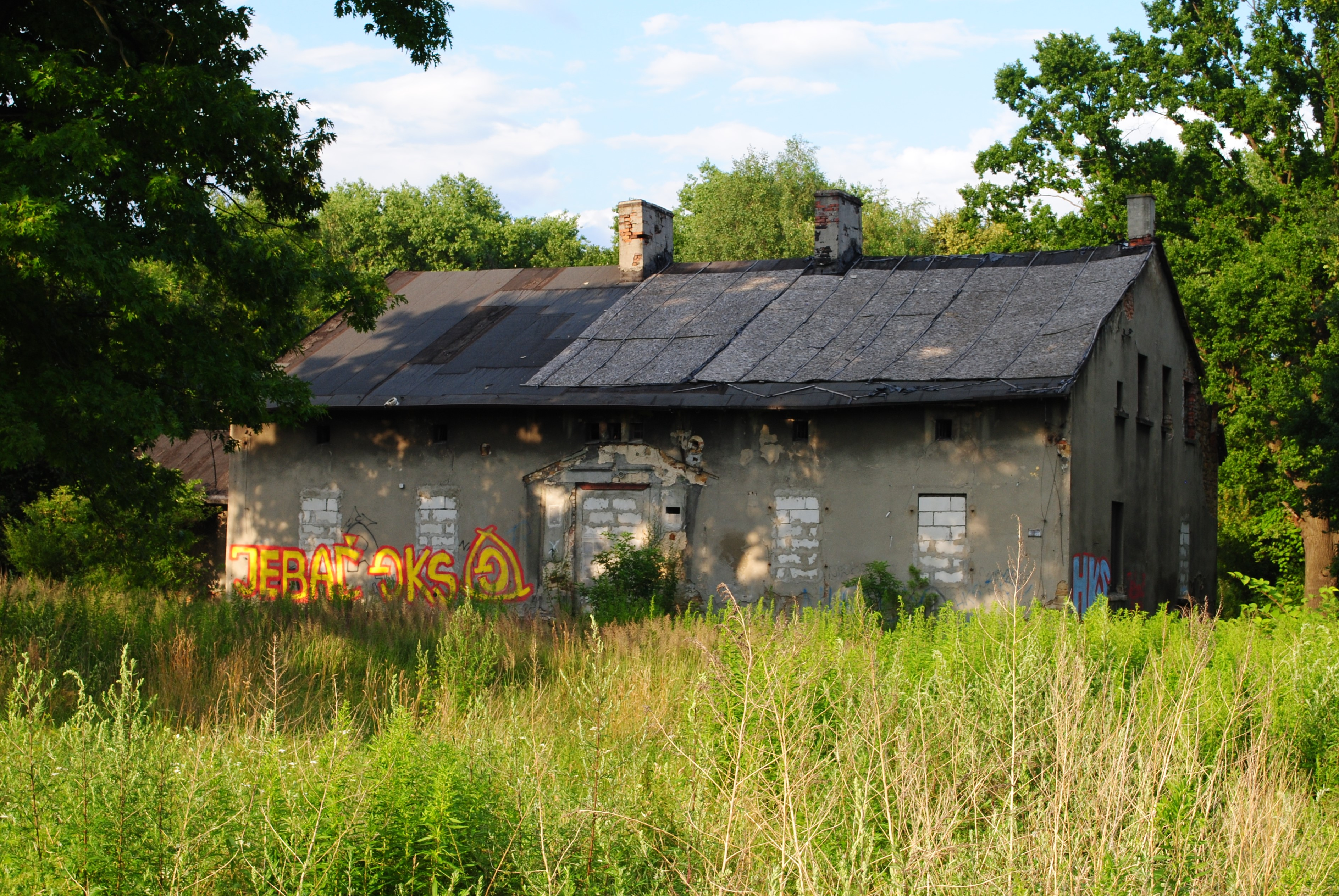 Katowice - Janów-Nikiszowiec. Stary dworek Mieroszewskich przy ul. Nad Stawem 3a